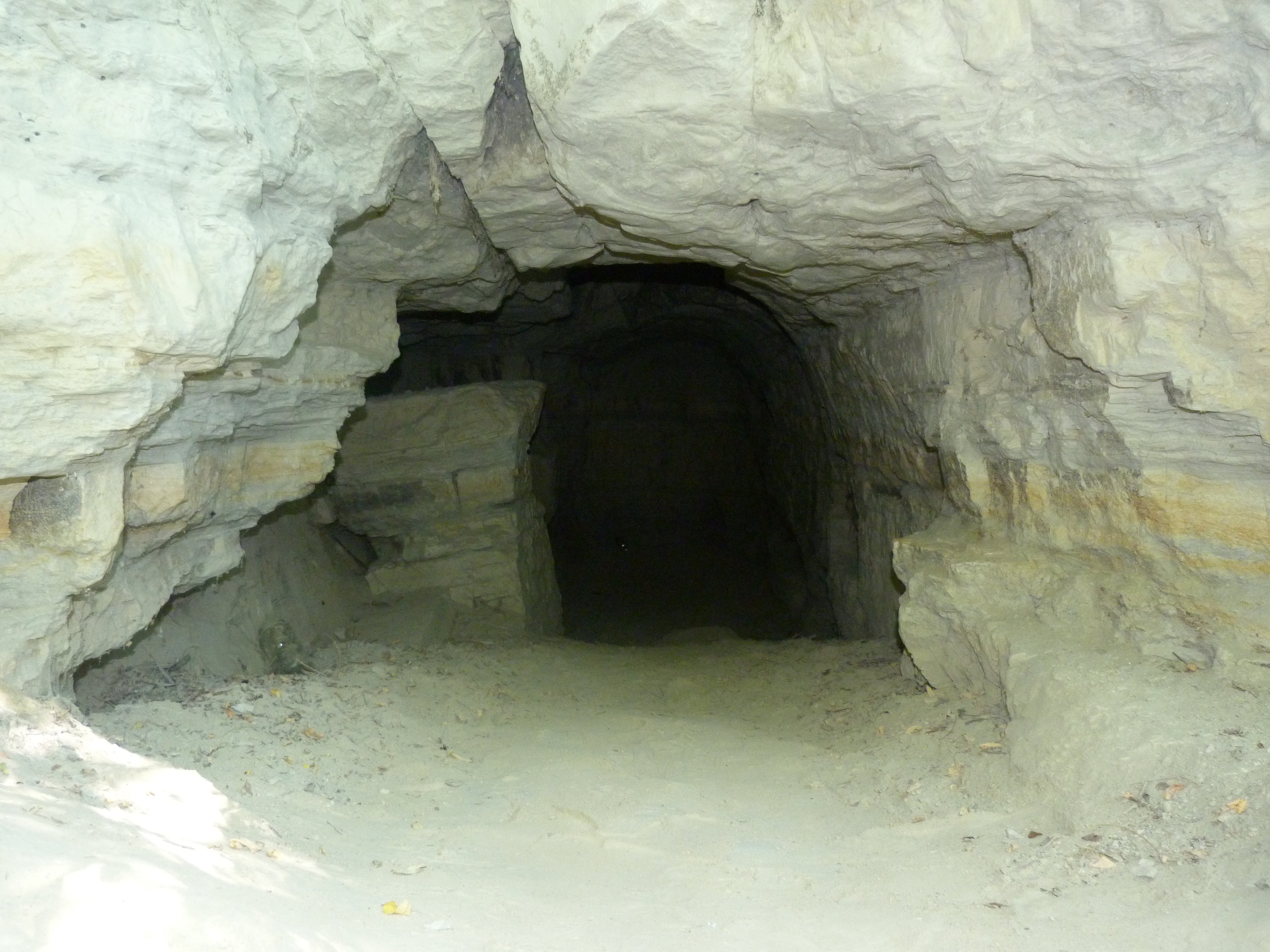 A felvétel 2015. augusztus 4-én kedden készült Balatonkenesén. Balatonfő, Tatár lik. A Tatát likak a kerékpáros Kenese Kör útvonaláról közelíthető meg. A balatonkenesei Magas Part oldalába vájt Tatár likakban a helyiek húzták meg magukat ellenséges betörés idején. A tatárok, törökök elől menekülve találtak itt menedéket. Később ezek a pannon üledékbe vájt lyukak a legszegényebbek lakásai lettek. A Magas Part a legújabb korban jelentős változásokon ment át. A Balaton 1861-ben történt lecsapolása után a Balaton vize 200-300 méterrel visszahúzódott. Ezzel a meredek partoldalban levő Tatár likak szinte megközelíthetetlenné váltak. Összesen 9 barlangot rejt a partoldal, melyek 5 szinten helyezkednek el. A barlangokat Jankó János és Soós Lajos költő kutatták. A Magas Part anyaga a közhiedelemmel ellentétben nem lösz, hanem Pannon tengeri üledék, amely cca 10 millió évvel ezelőtt rakódott le a sekély tengerből. A meredek fal létrejöttét a Balaton hullámverése okozta, mely alámosta a laza üledékből álló partot.